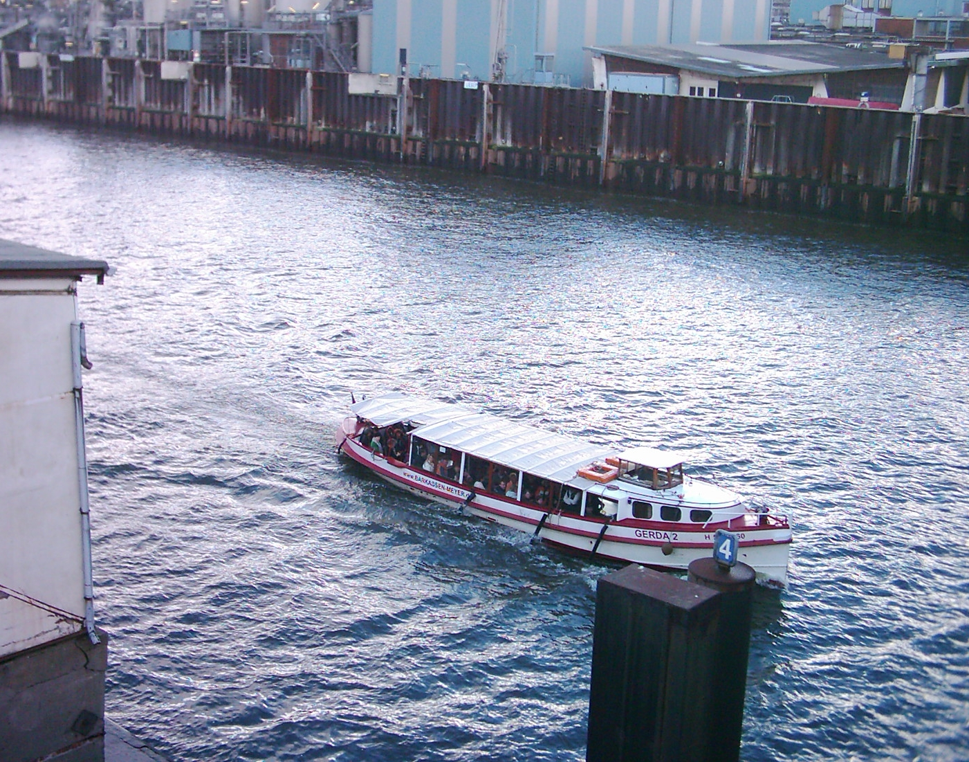 Barkasse auf dem Reiherstieg in Höhe der Argentinienbrücke.